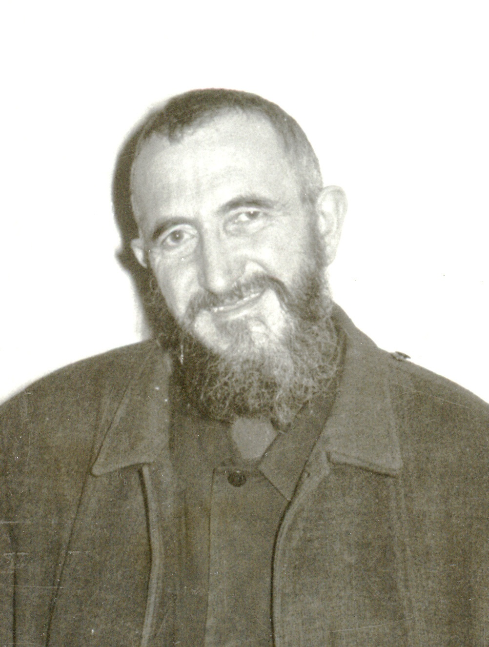 Abbé Pierre circa 1980